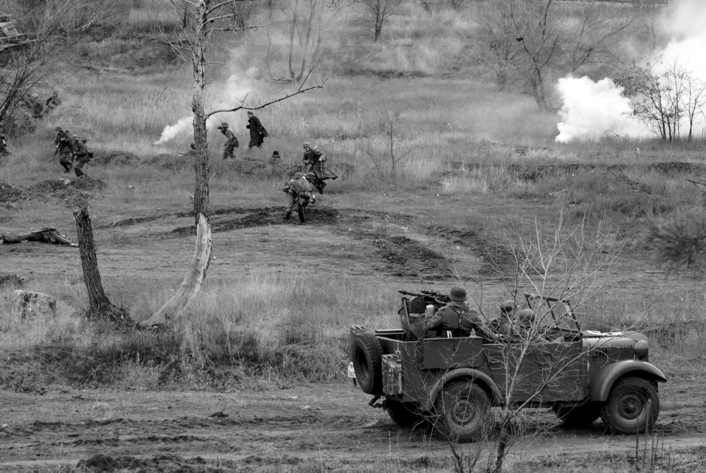 Реконструкция начала контрнаступления советских войск под Сталинградом. Пойма реки Царица